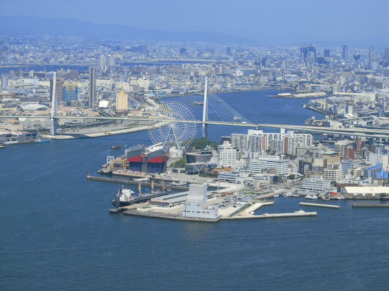 大阪港北